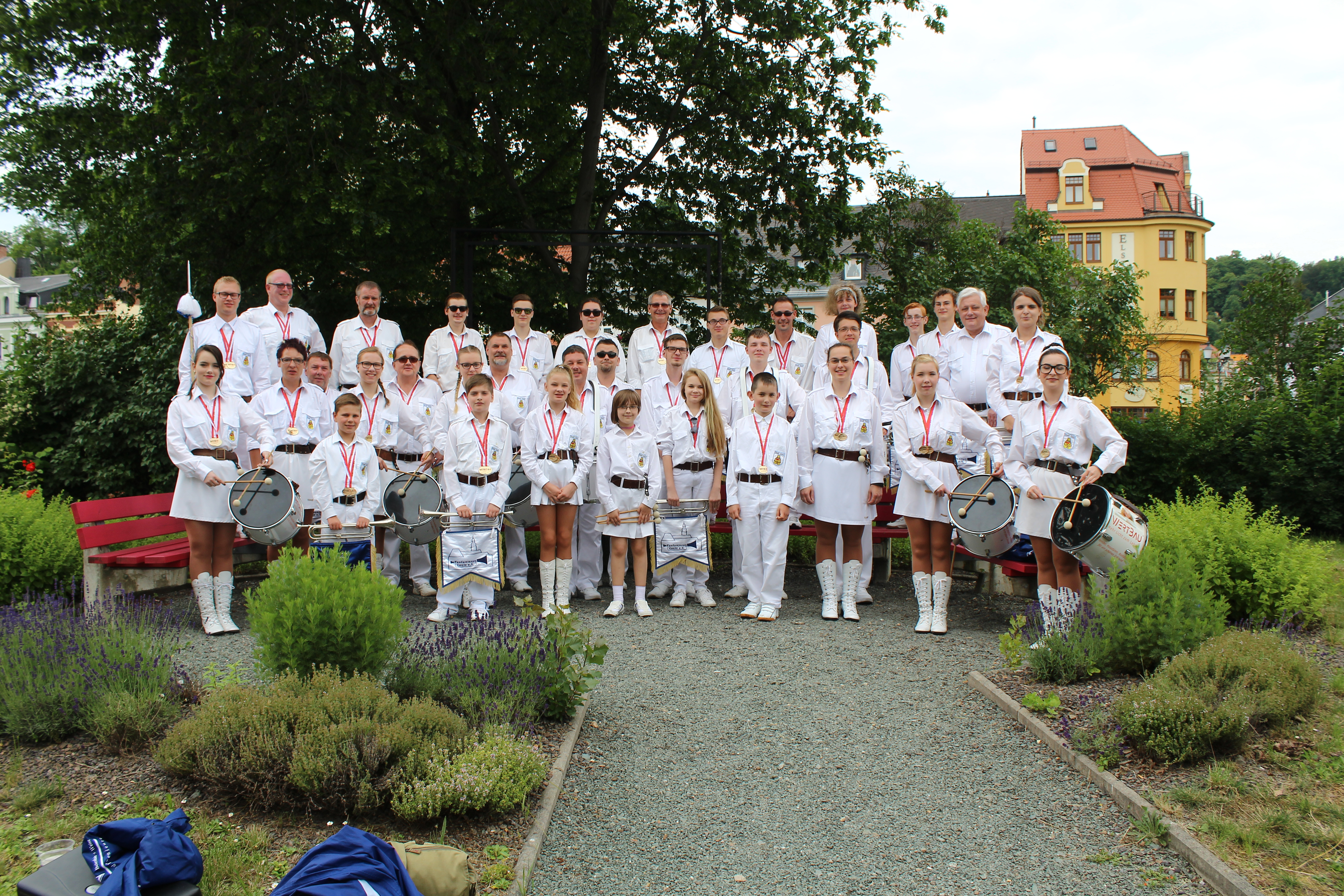 Der Fanfarenzug Greiz präsentiert sich zum Park- und Schlossfest in Greiz